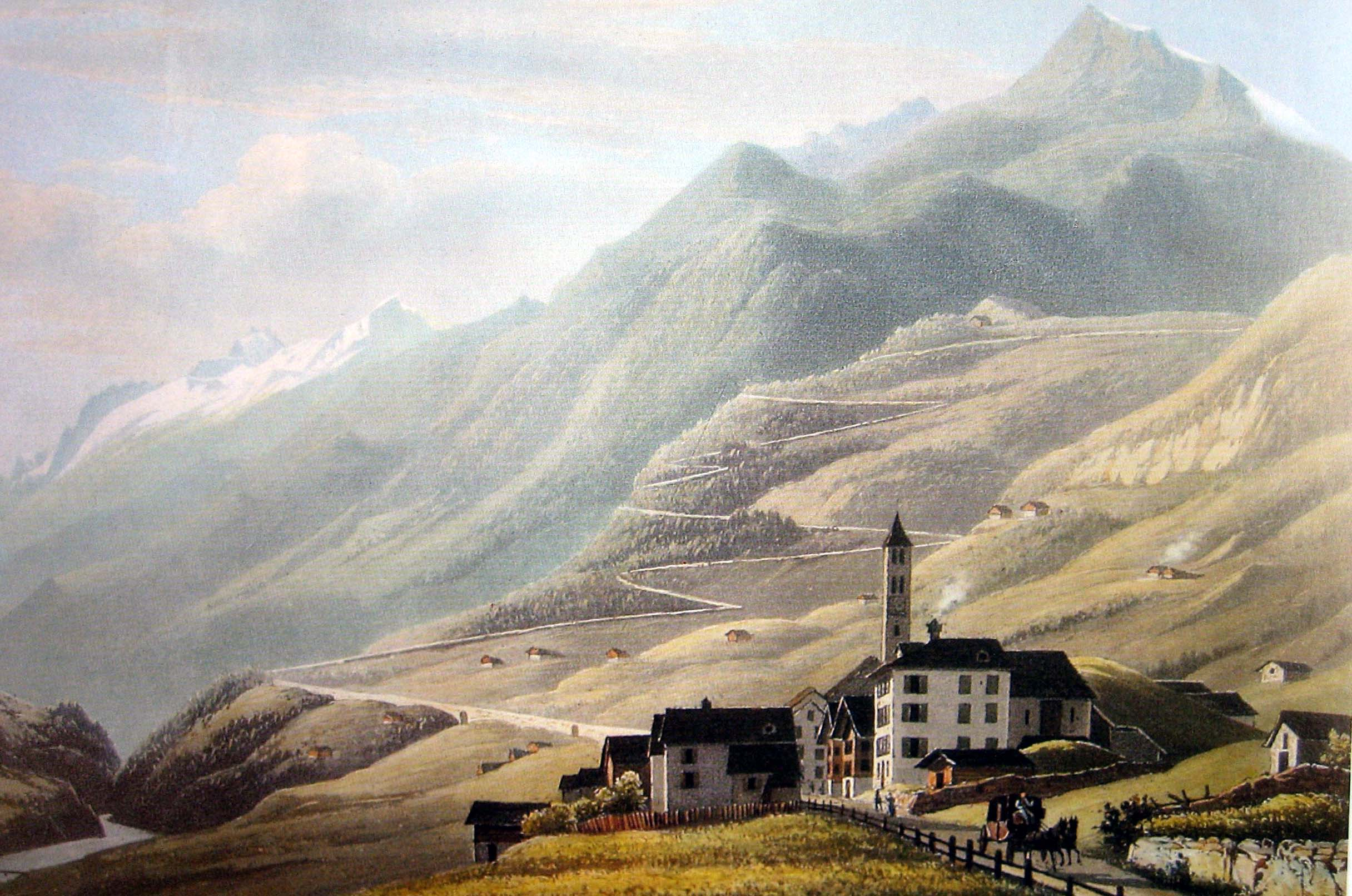 Airolo 1835, kol. Aquatinta von Weber nach Zeichnung von Corrodi